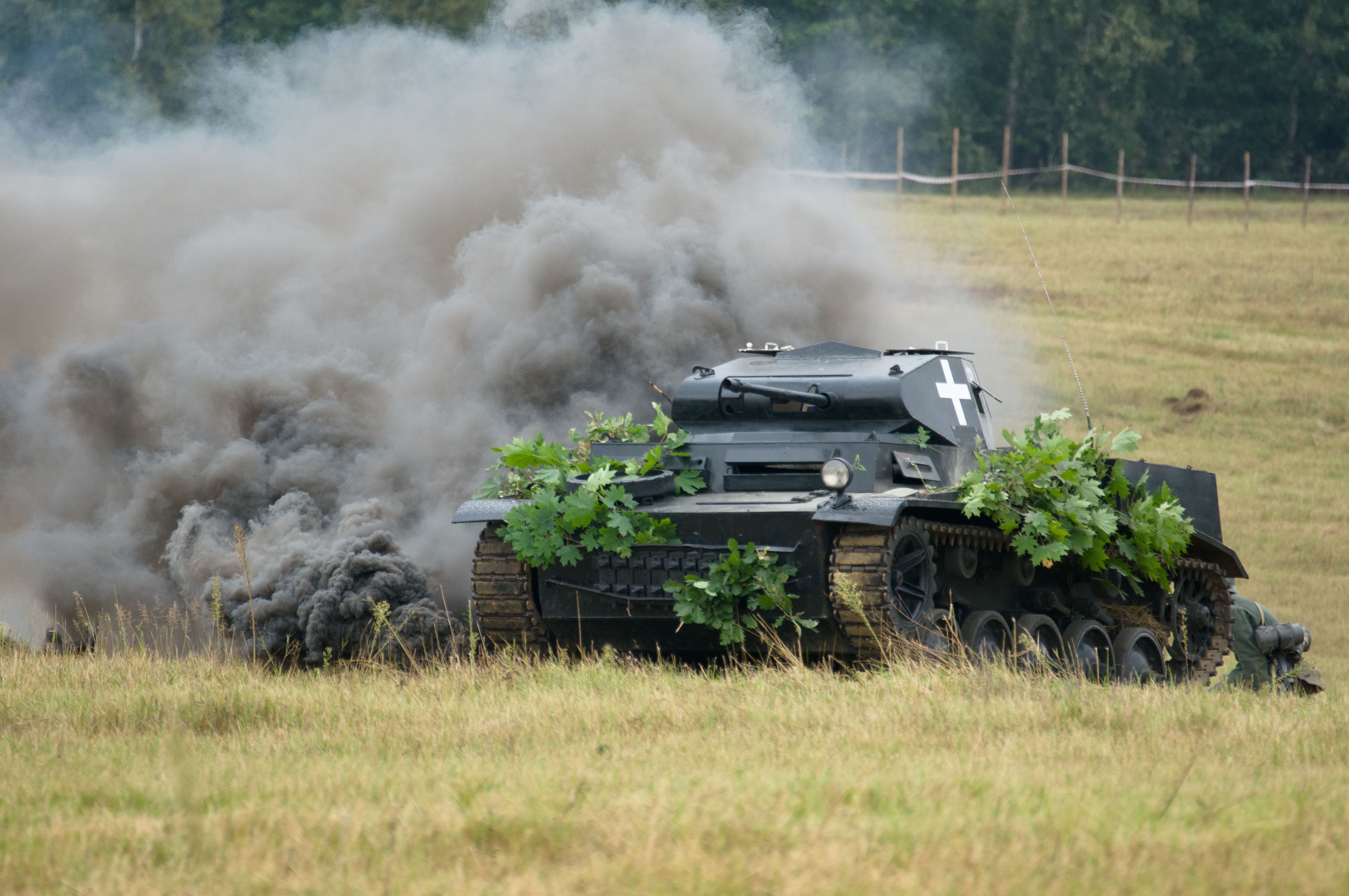 V rekonstrukcja Bitwy pod Mławą, 1. września 2012.